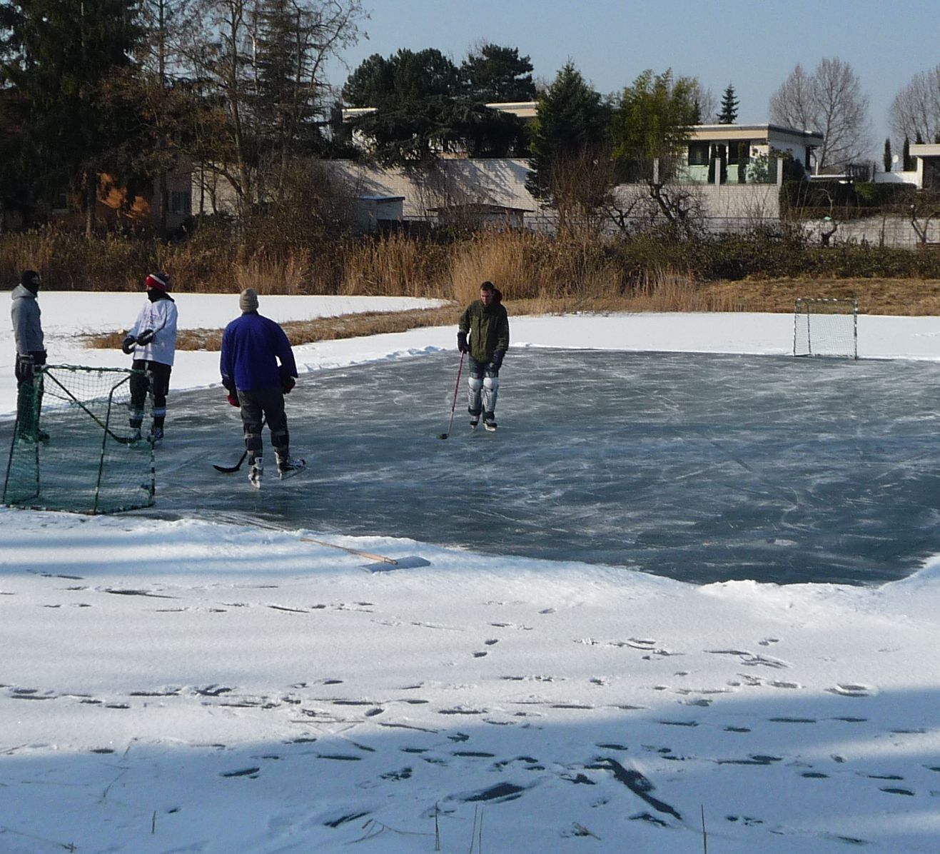 Eishockey auf dem Backsteinweiher